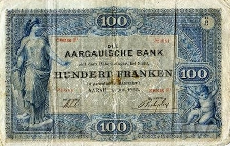 Svájc, Aargauische Bank 100 frank 1883.